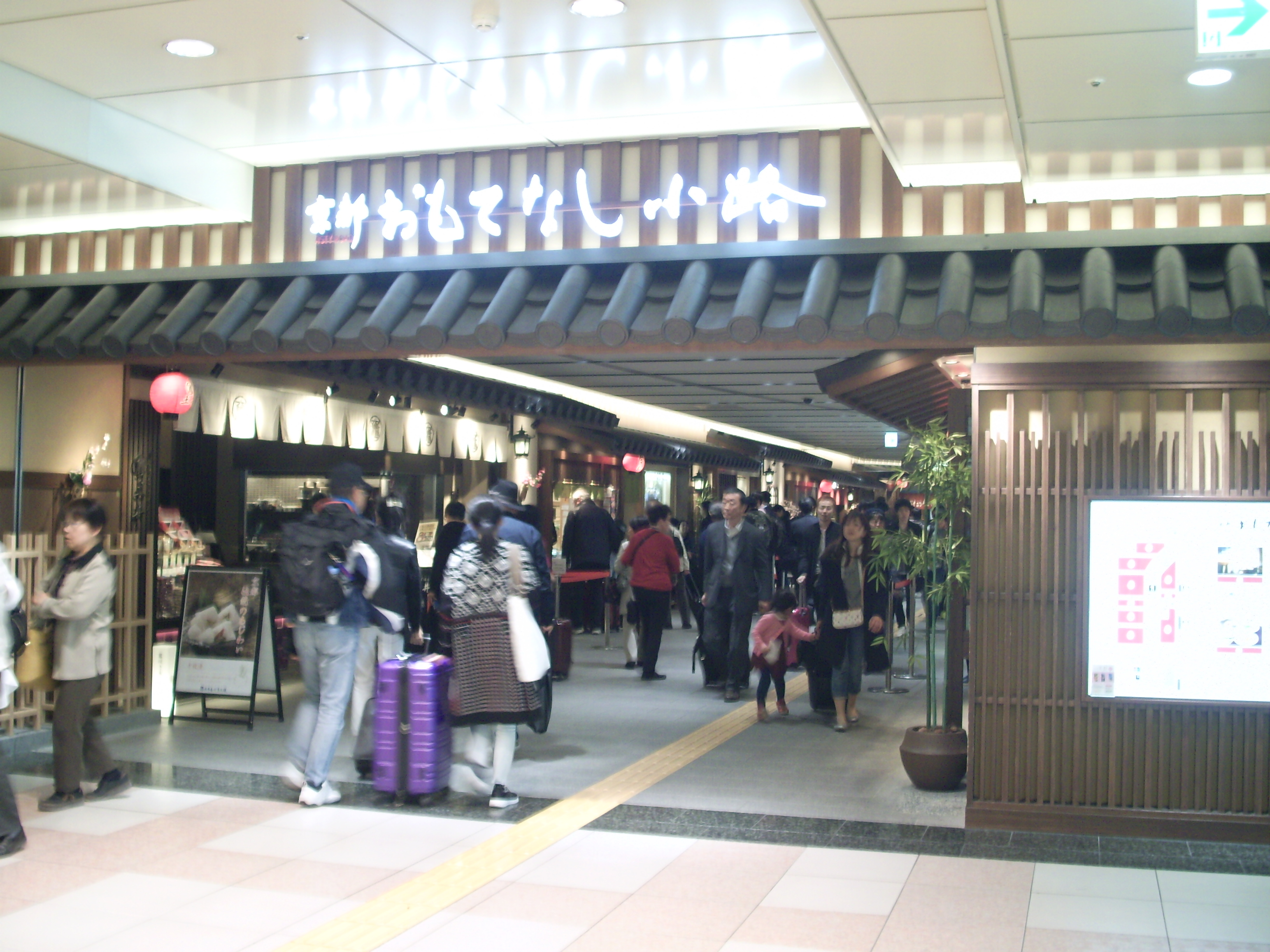 京都駅東海道新幹線ホーム階下に立地するアスティロードの飲食店街「おもてなし小路」 ㊟カメラを起動すると日付機能が出荷時のものに初期化されるため、ファイル履歴の投稿日時とメタデータの原画像データの生成日時が異なります（本概要欄の下記日付が撮影日）